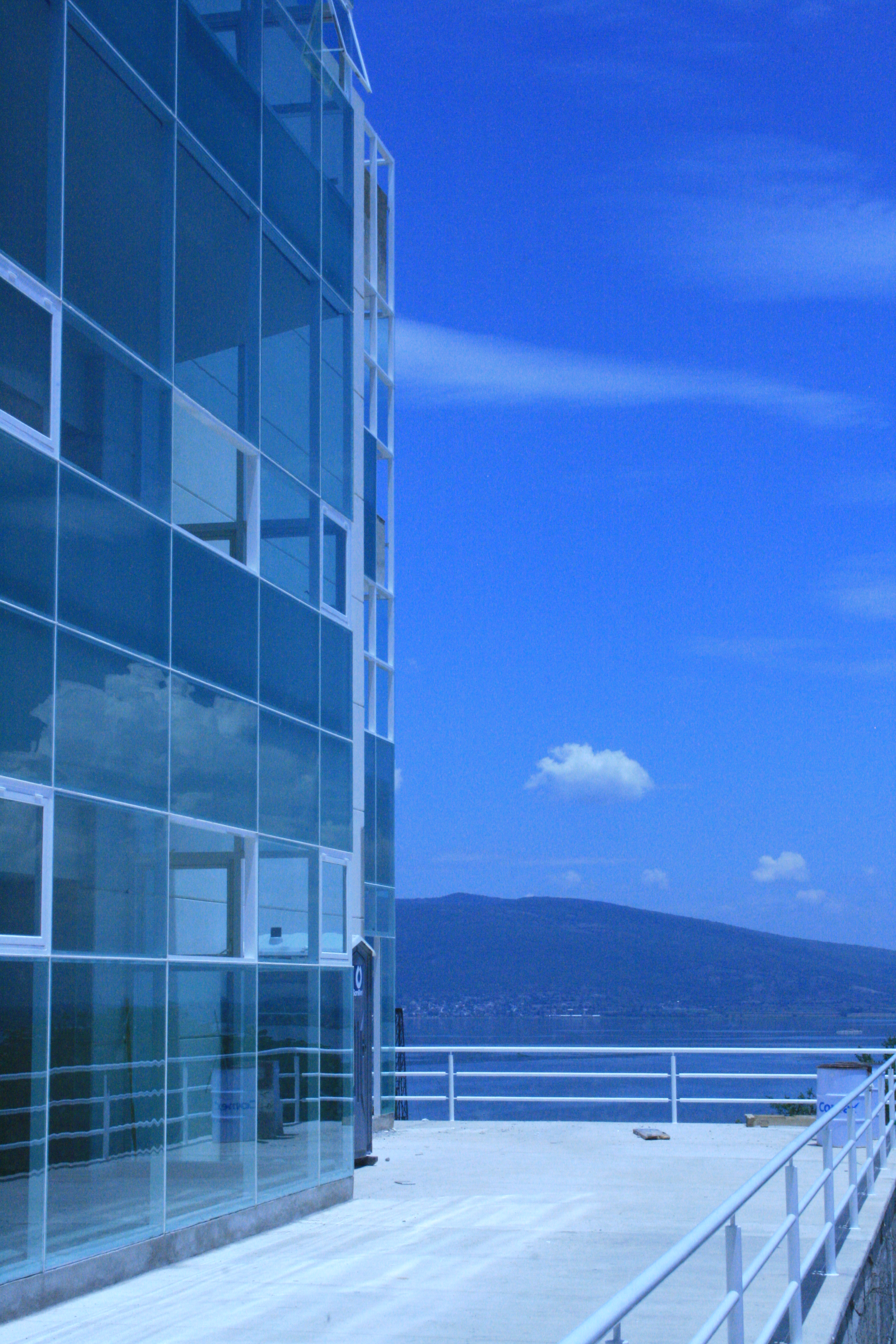 Campus Irapuato-Salamanca Sede Yuriria